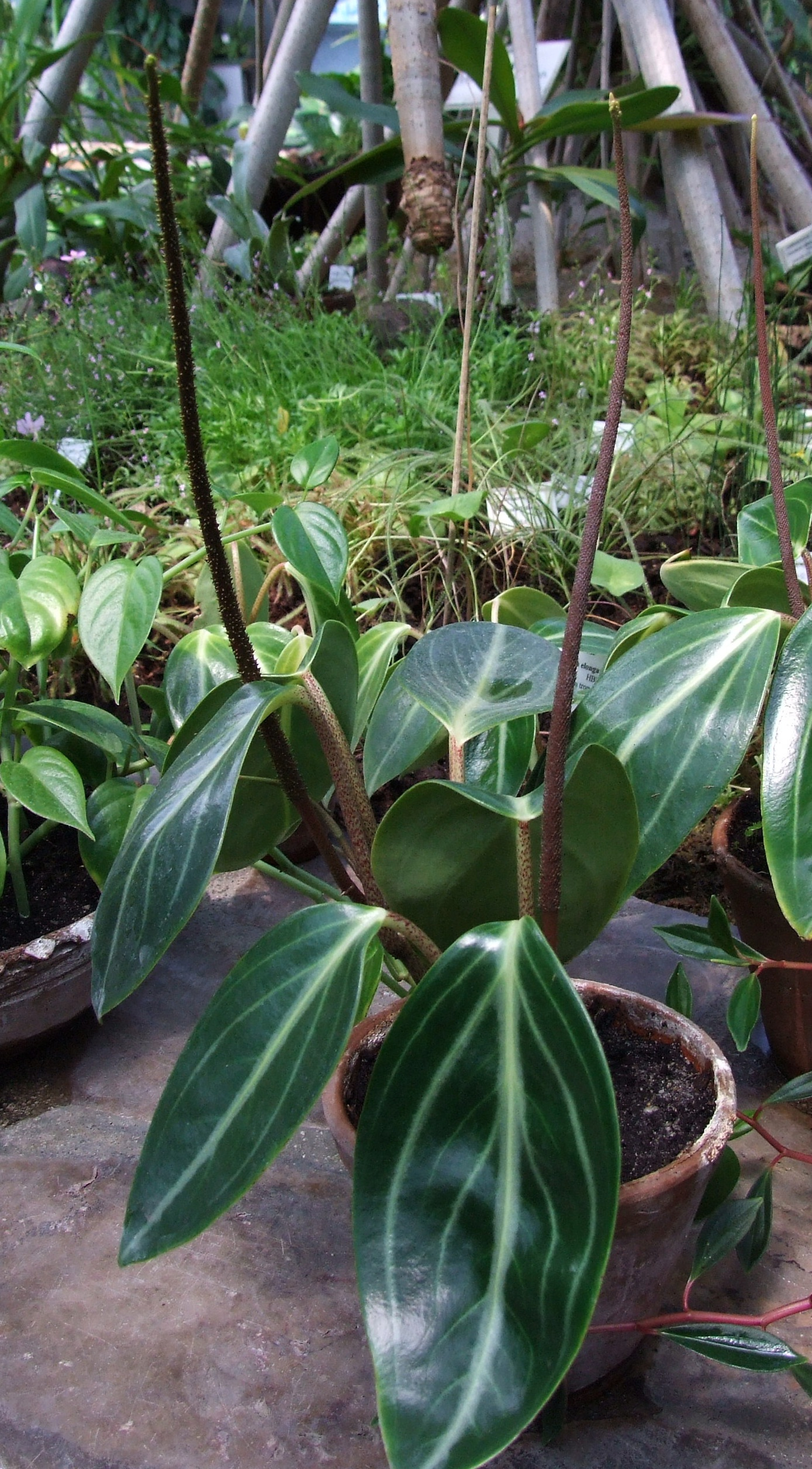 Peperomia elongata